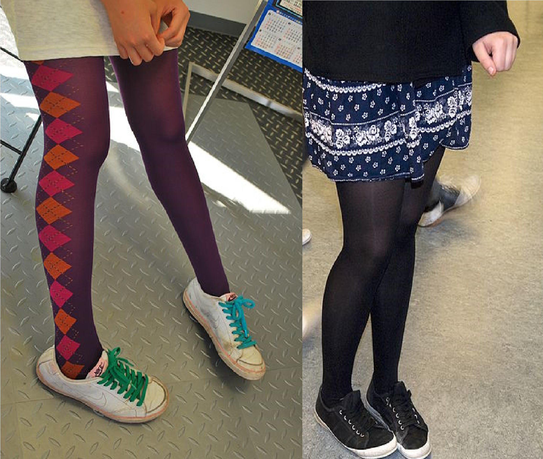 Crurofilia masculina.